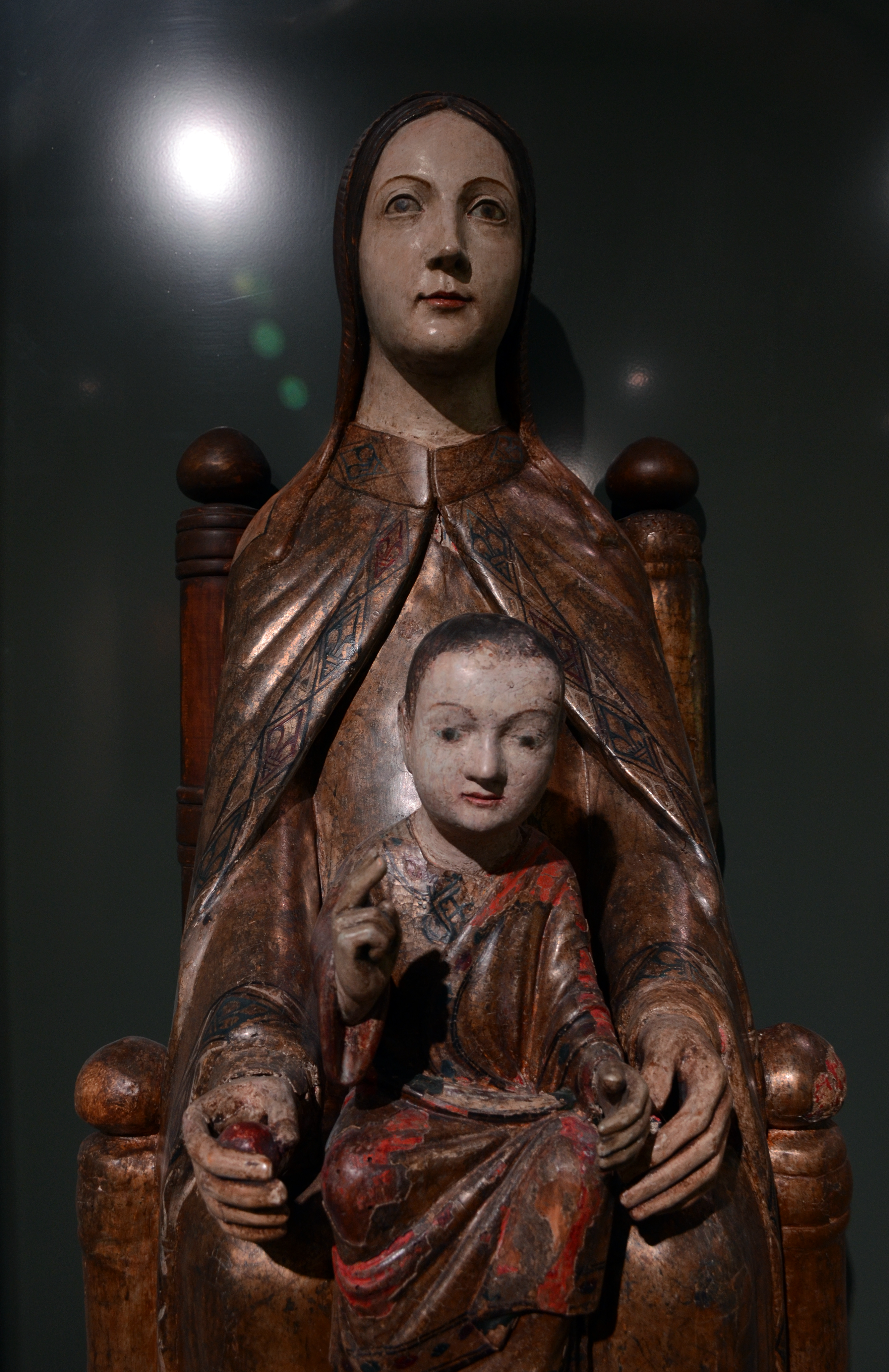 Sedes sapientiae, travail mosan, 11ème-12ème siècle, bois ; détail . Musée M, à Louvain ( Leuven ).